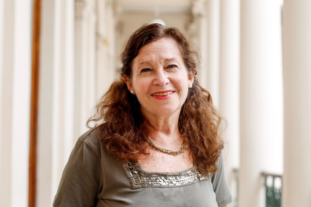 Noemí Zaritzky en el rectorado de la UNLP.